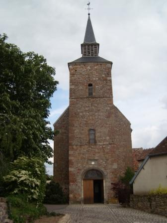 vesdun kyrka